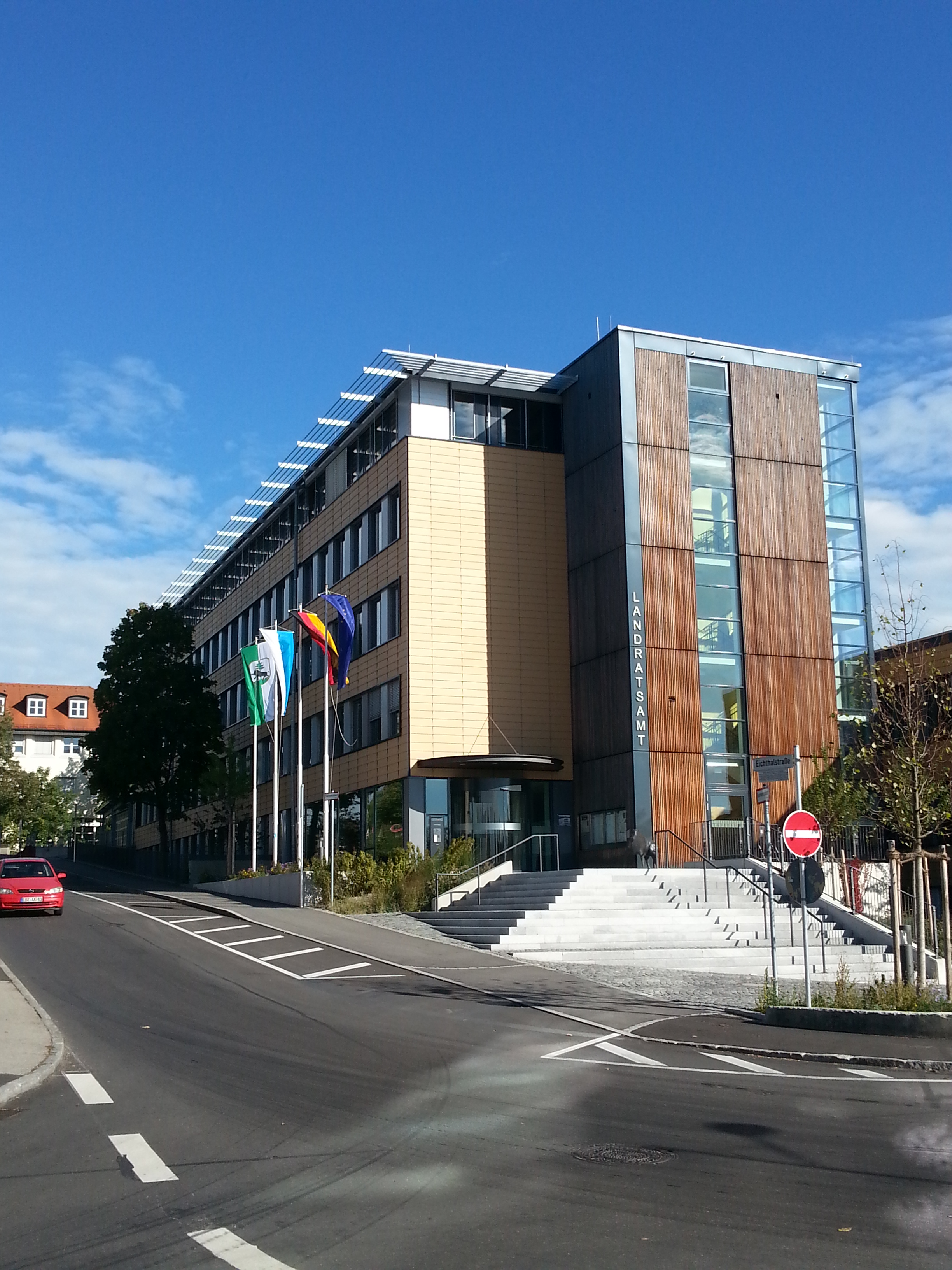 Landratsamt Ebersberg mit Beflaggung